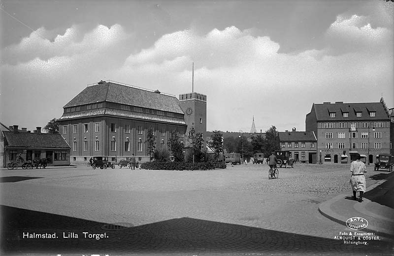 Lilla torg. Motiv: Halmstad Nyckelord: Riksintressen Kategori: Stadsmiljö, Torgmiljö Lilla torg.